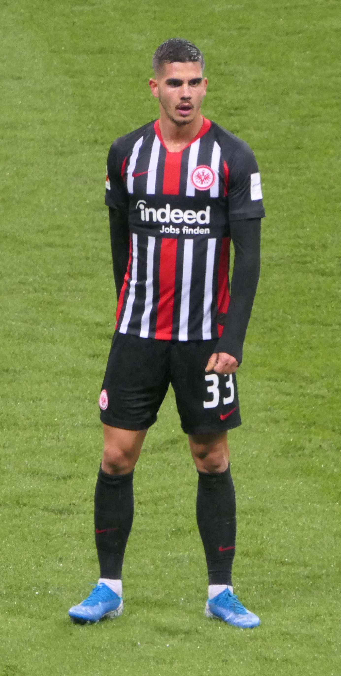 Der Fussballprofi André Silva im Trikot von Eintracht Frankfurt beim Heimspiel gegen den SV Werder Bremen am 06.10.2019.